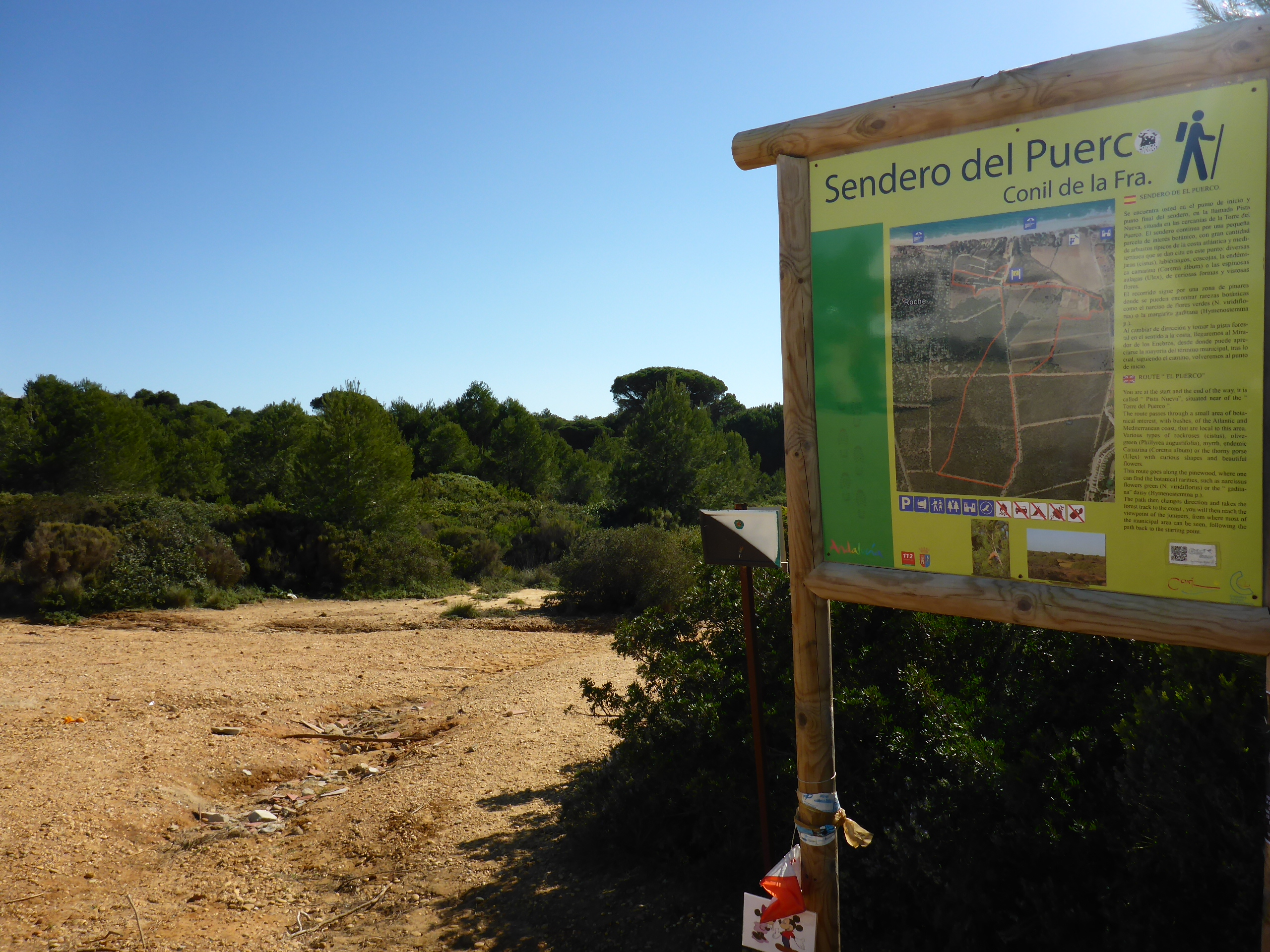 Pinares de Roche (Conil), prueba de Orientación (Andalucía, España)